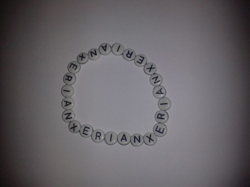 Són braçalets propis per a una entrada en Viquipèdia